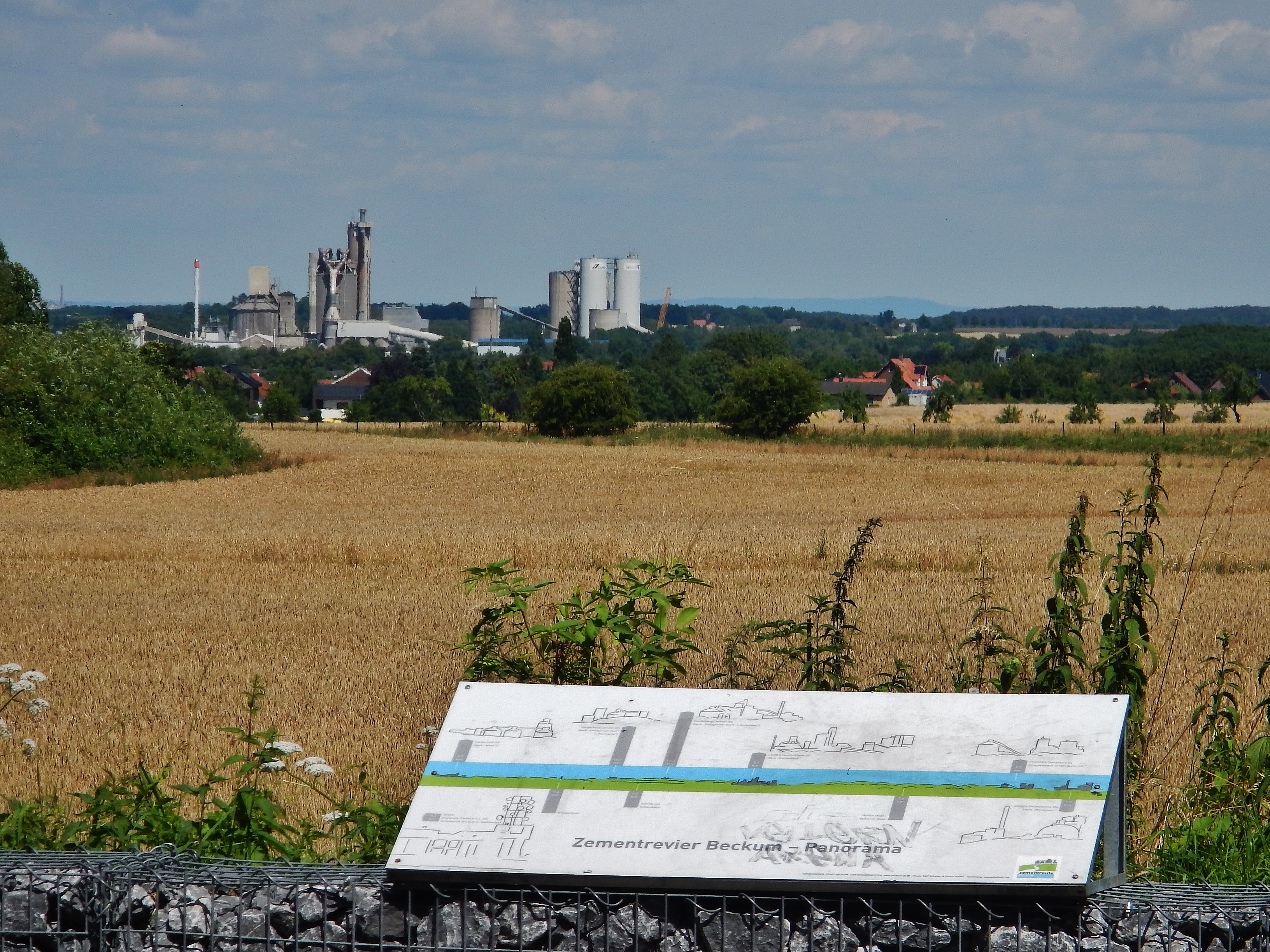 Zementrevier Beckum - Panorama: HeidelbergCement AG, Werk "Ennigerloh Nord" ("Anneliese")